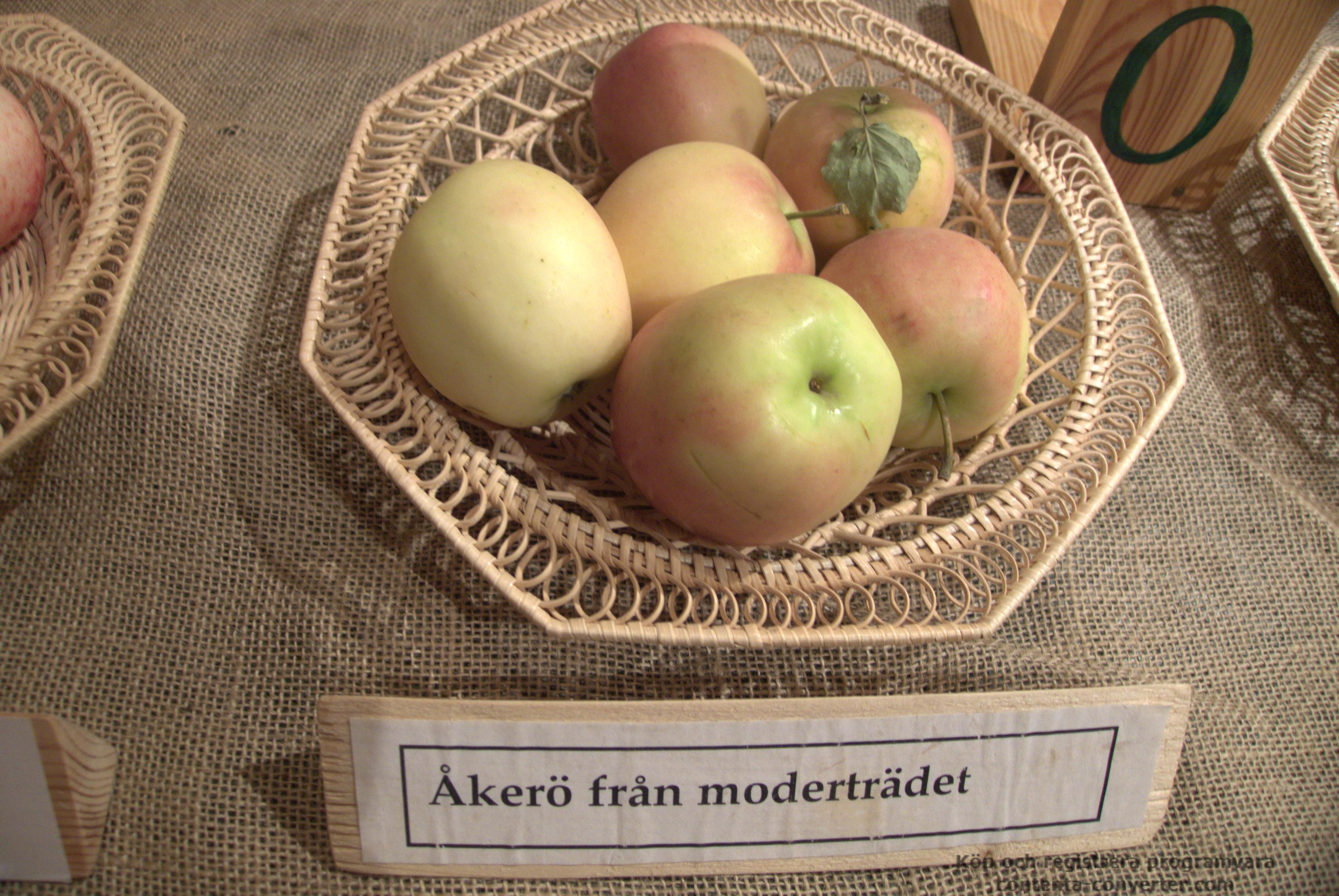 Äpplen av sorten Åkerö, från moderträd